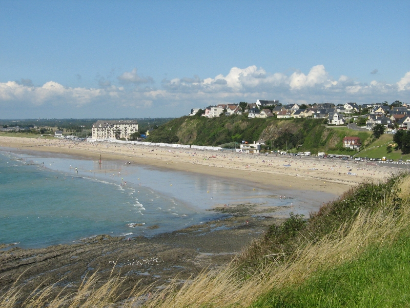 La plage de Donville-les-Bains